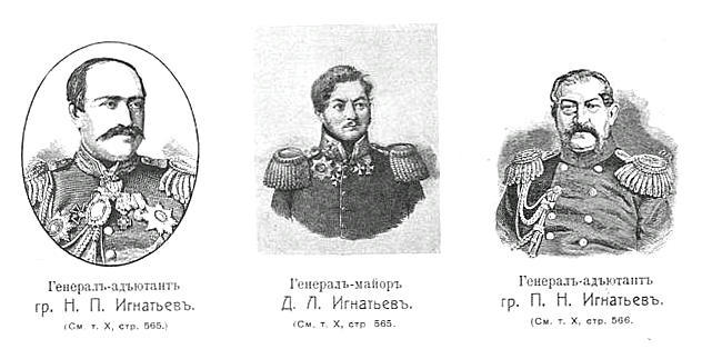 Это изображение было использовано для иллюстрирования статьи «Игнатьевы» опубликованной в десятом томе «Военной энциклопедии», который был издан книгоиздательским товариществом И. Д. Сытина в 1912—1913 гг. в столице Российской империи городе Санкт-Петербурге.